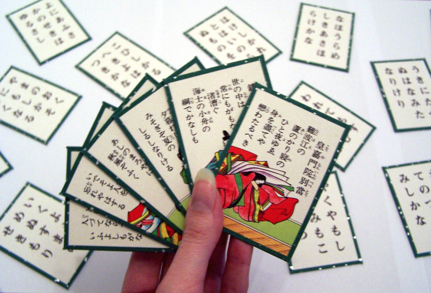 Cartes avec waka du jeu japonais karuta et cartes de kana en fond